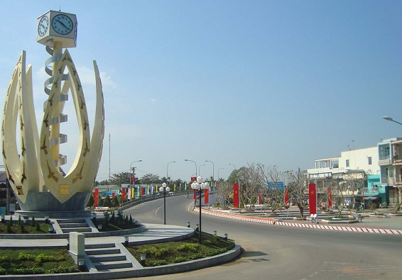 Một góc vòng xoay ngã năm